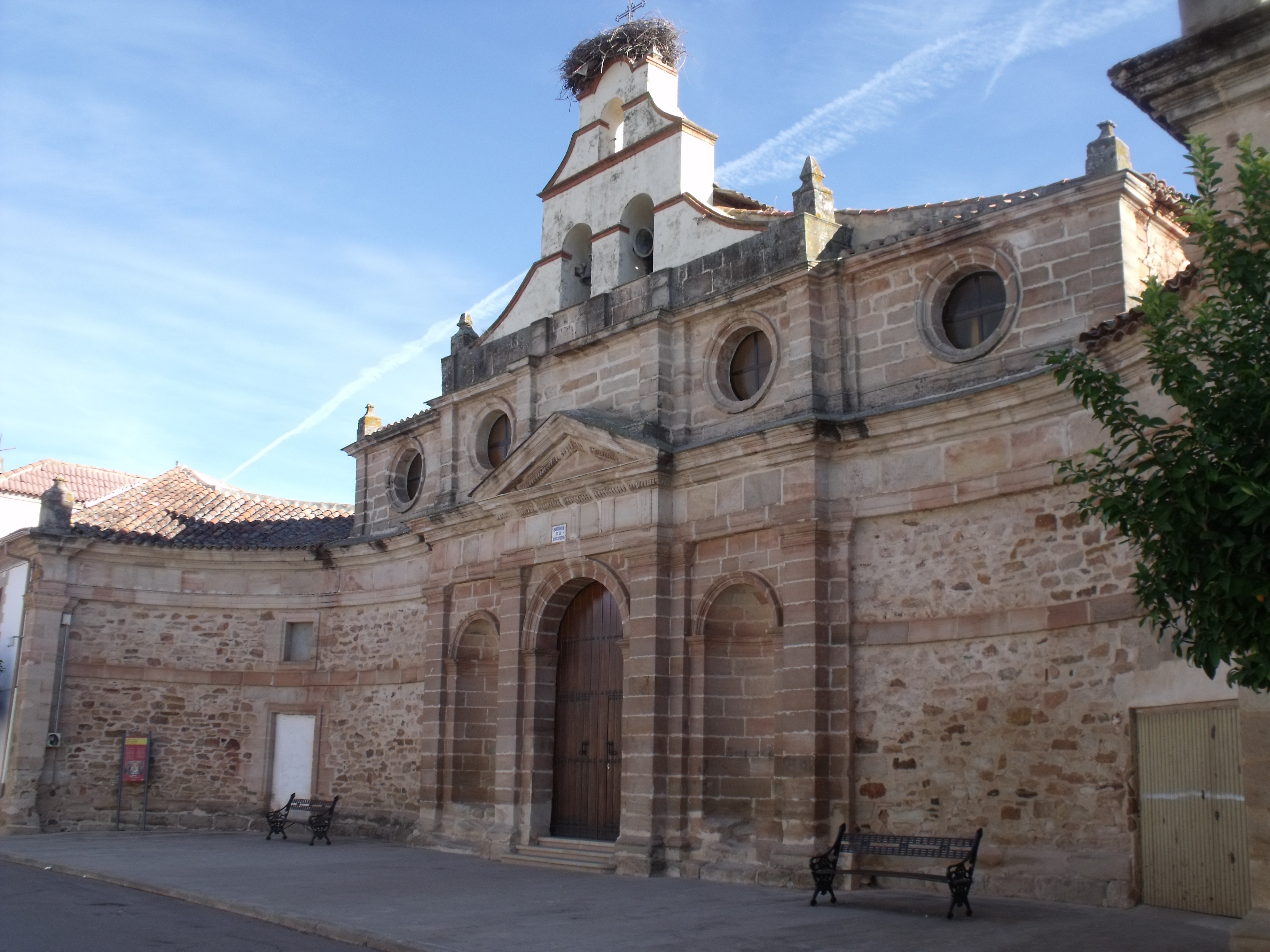 Iglesia de Carboneros